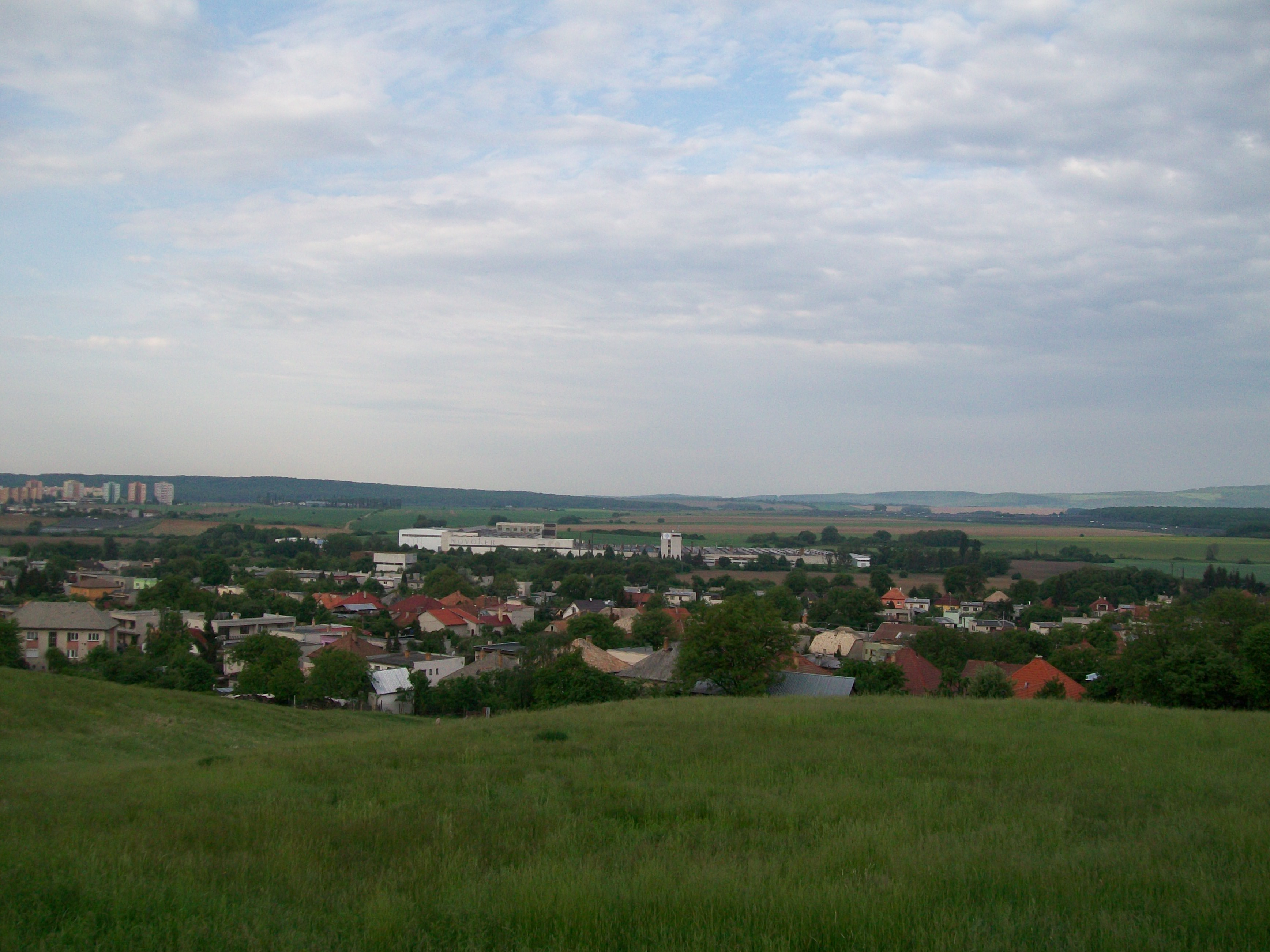 Pohľad na Vidinú